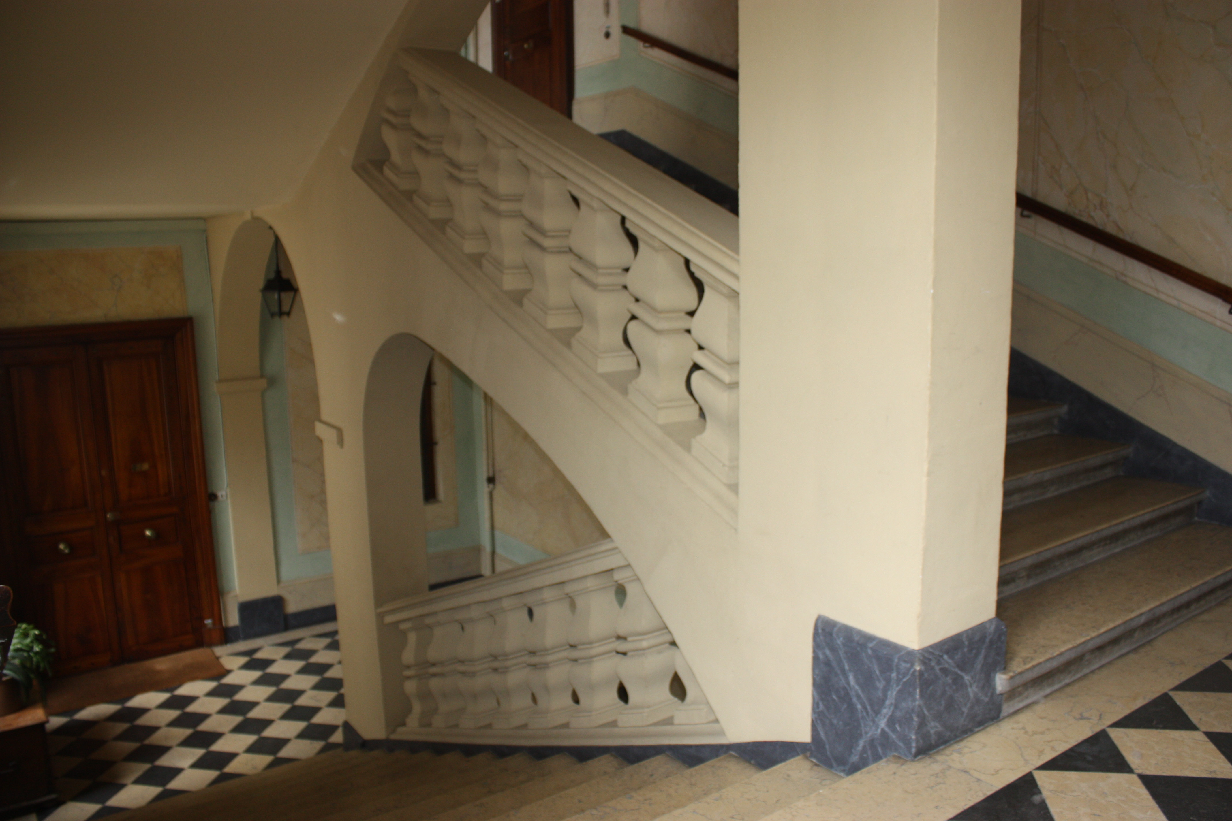 Escalier de l'Hôtel de la Première présidence, 6 rue Voltaire - Grenoble